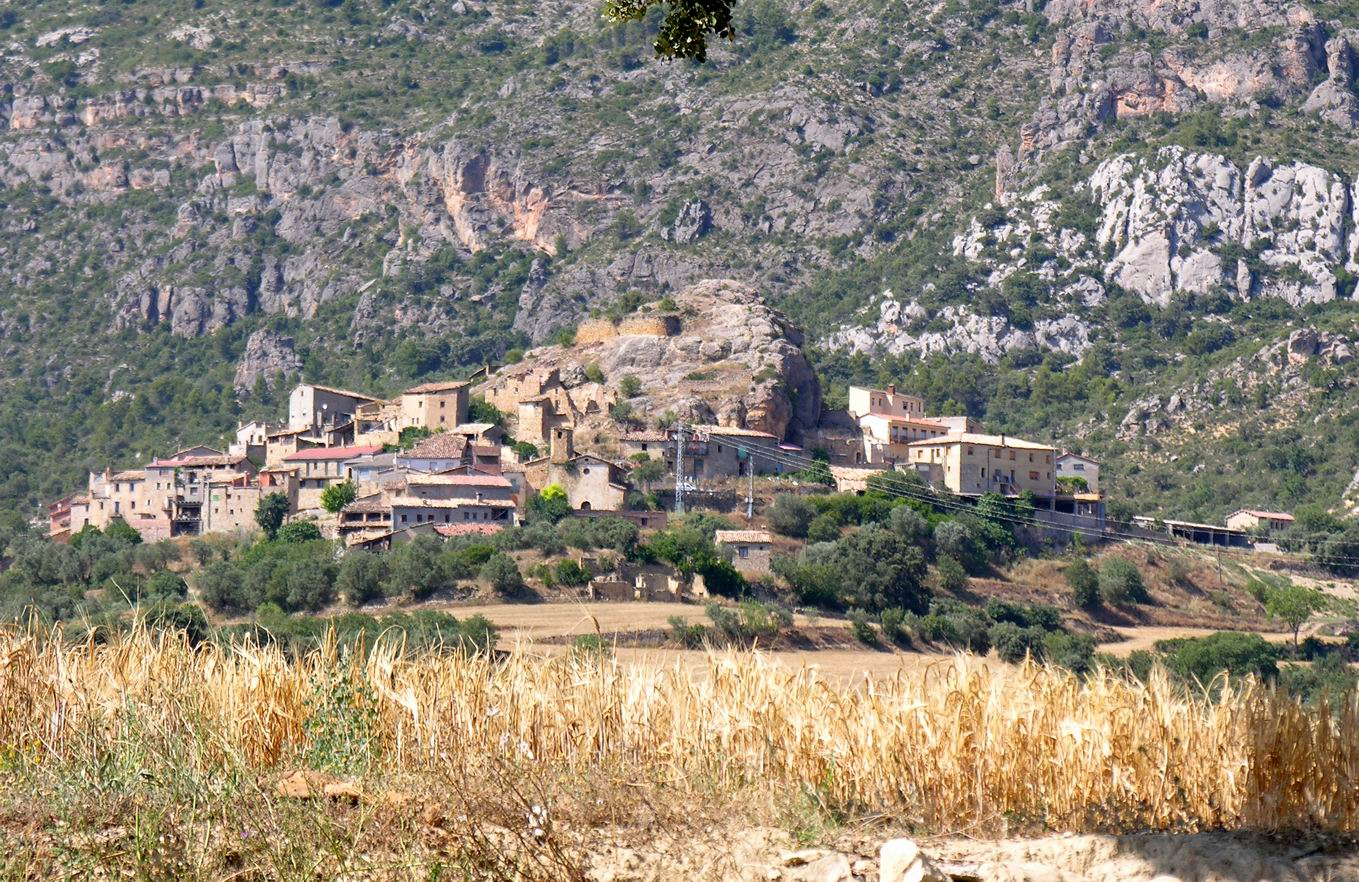 Corçà des de Ca l'Hereuet Un dissabte immillorable!